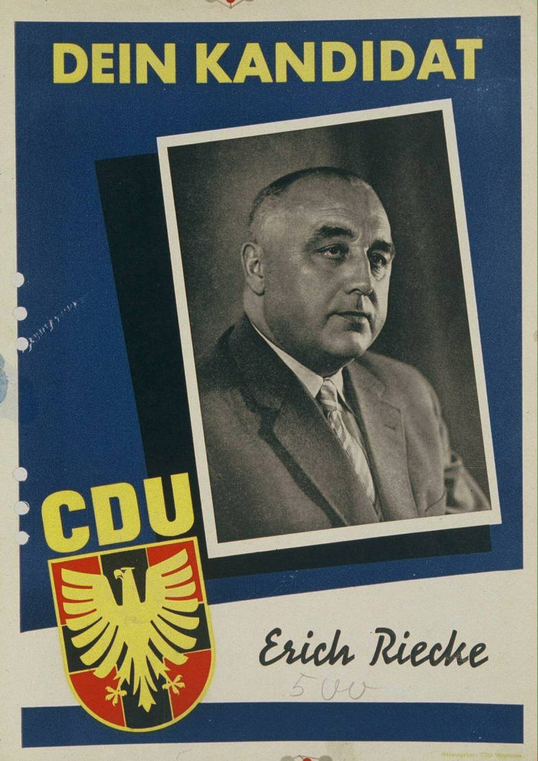 Dein Kandidat Abbildung: Porträtfoto Plakatart: Kandidaten-/Personenplakat mit Porträt Auftraggeber: CDU Westfalen Objekt-Signatur: 10-001: 739 Bestand: Plakate zu Bundestagswahlen (10-001) GliederungBestand10-18: Plakate zu Bundestagswahlen (10-001) » Die 3. Bundestagswahl am 15. September 1957 » CDU » Mit Porträtfoto Lizenz: KAS/ACDP 10-001: 739 CC-BY-SA 3.0 DE